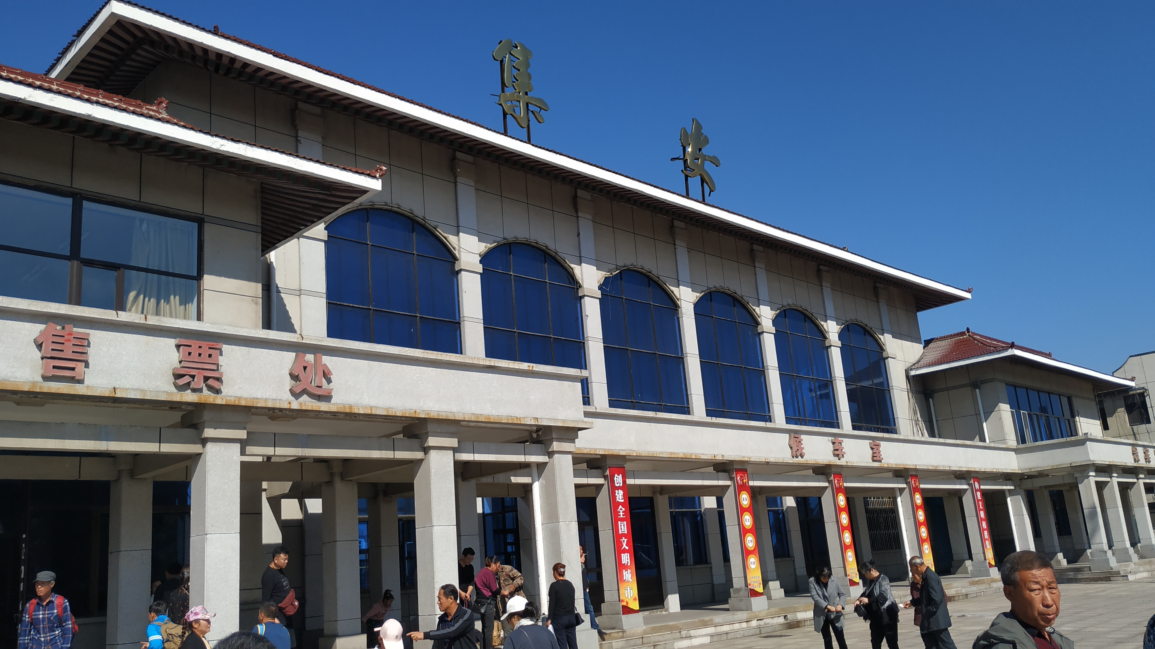 中文（中国大陆）: 集安车站站房